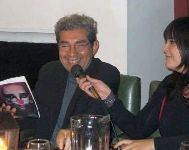 Presentación del libro Claroscuro, de María Emilia Bianchi. Casa Castro, Santiago del Estero, Argentina. Al lado de la autora, Julio Carreras (h).